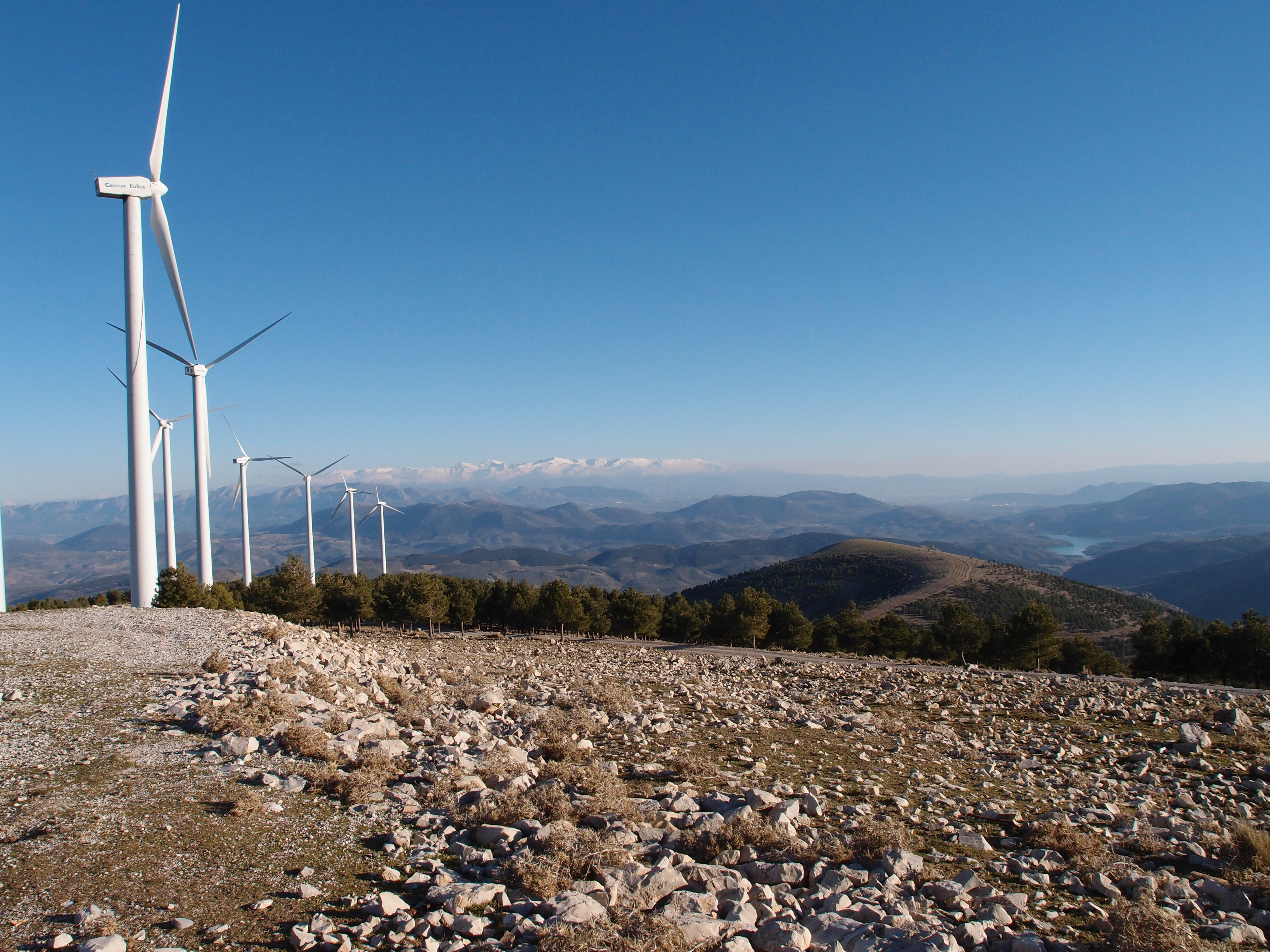 Vista del Parque Eólico de Sierra del Trigo y de Sierra Nevada al fondo.